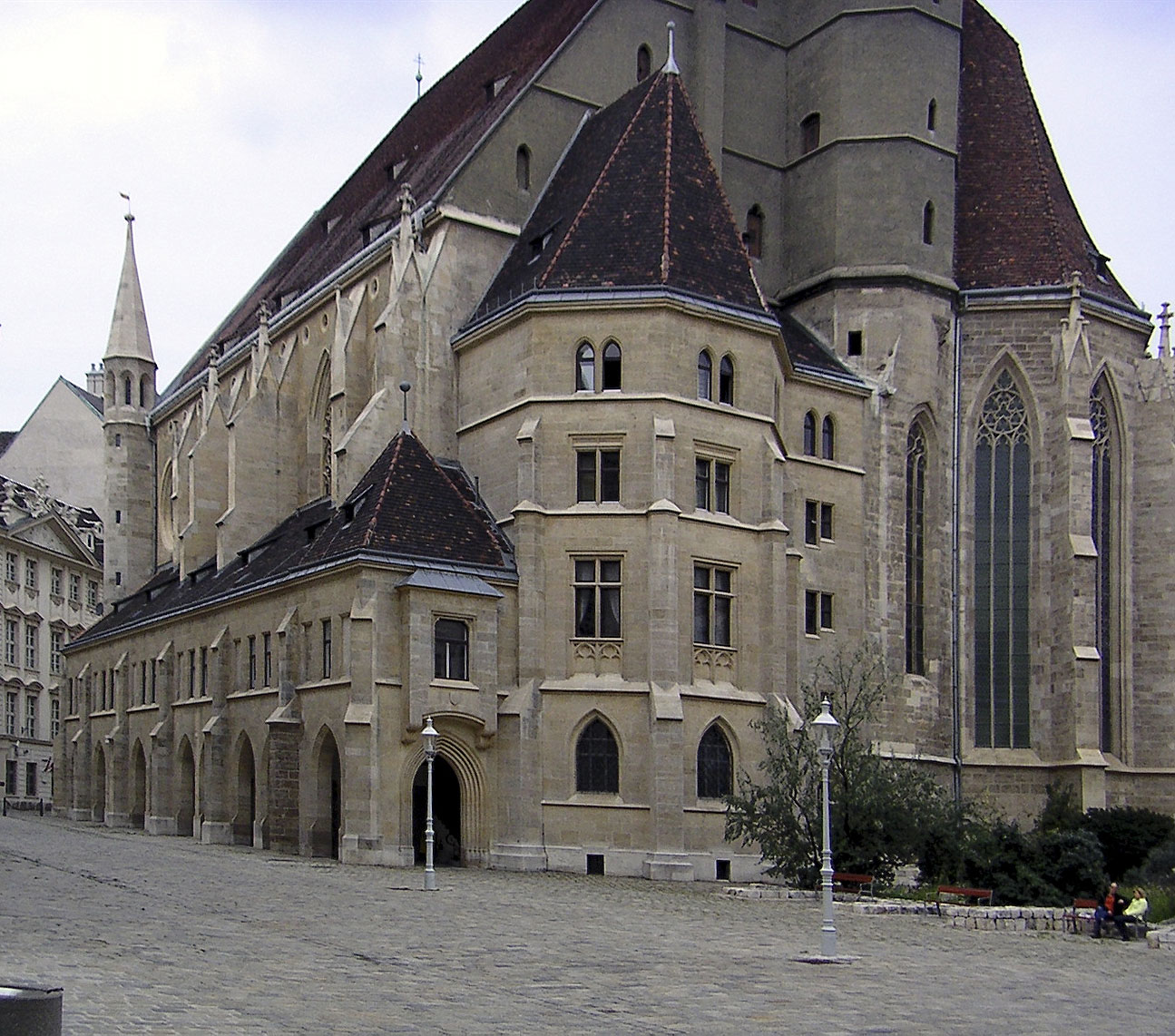 Minoritenkirche, Wien, selbst fotografiert